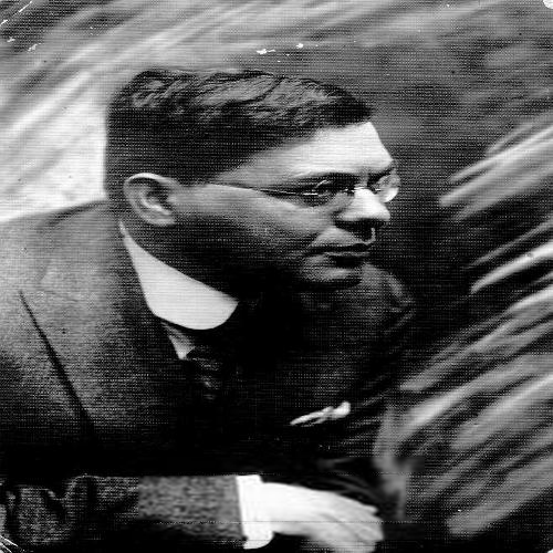 טונקלר (טונקעלער) (סופר), וארשה, 21.6.1922